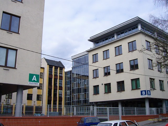 Tomaszów Mazowiecki budynek zus